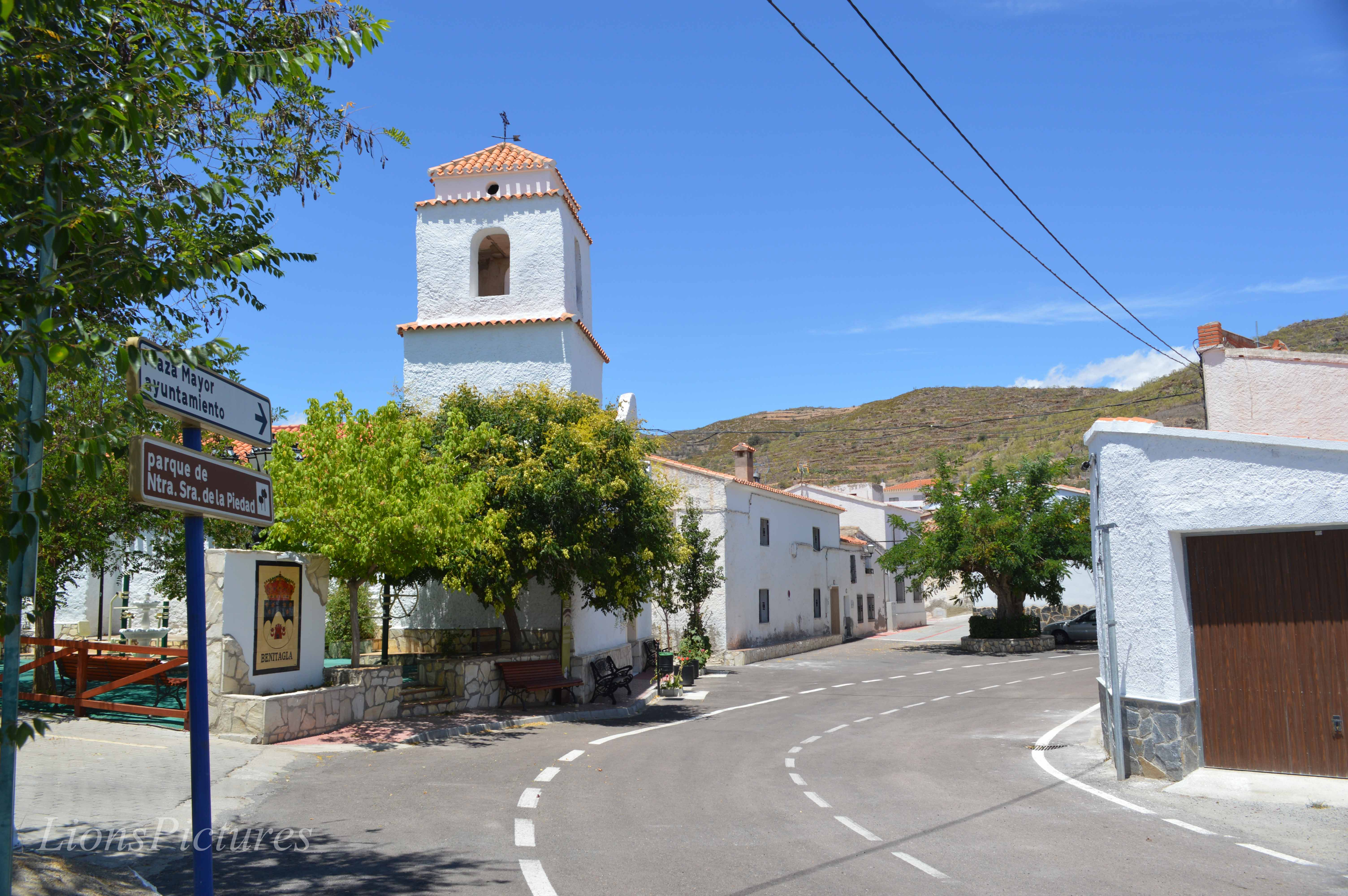 Acceso desde Benizalon